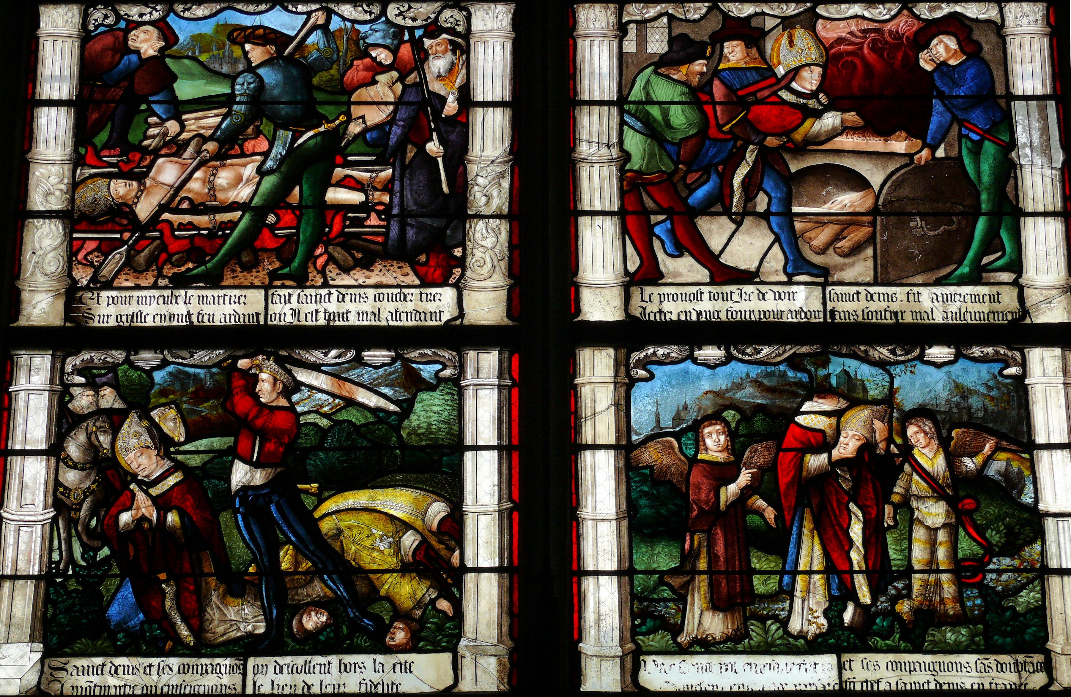 Bourges - Cathédrale - Chapelle de Bar - Vitrail de la vie de saint Denis de Paris